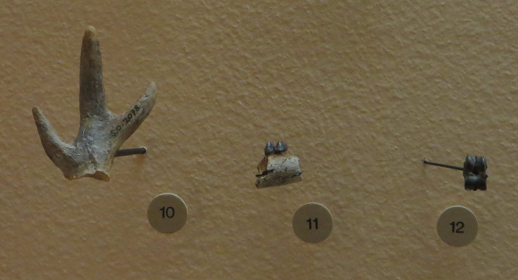 Fossil of Lagomeryx- Took the picture at Natural History Museum, Basel